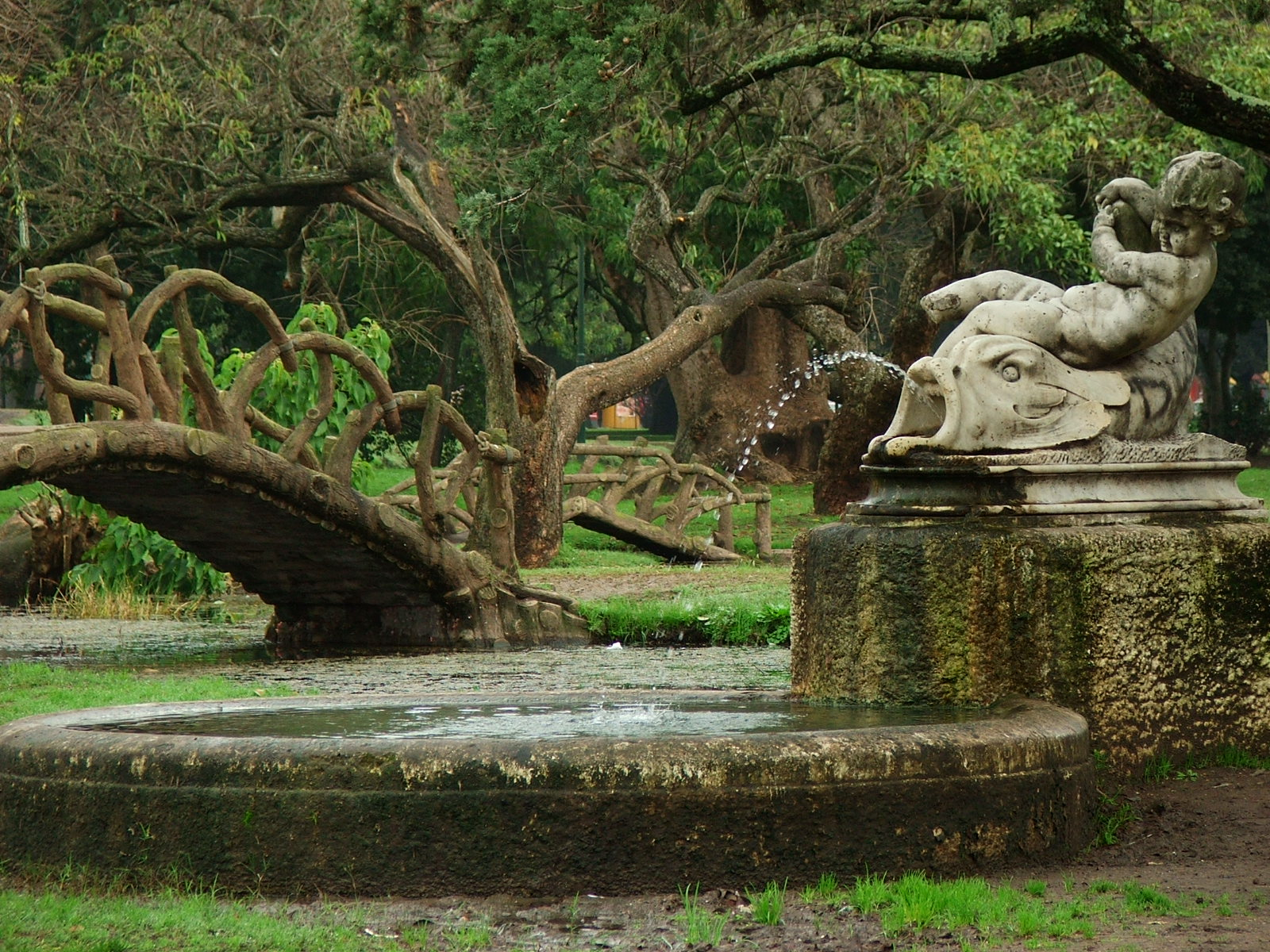 Parque Saavedra en La Plata